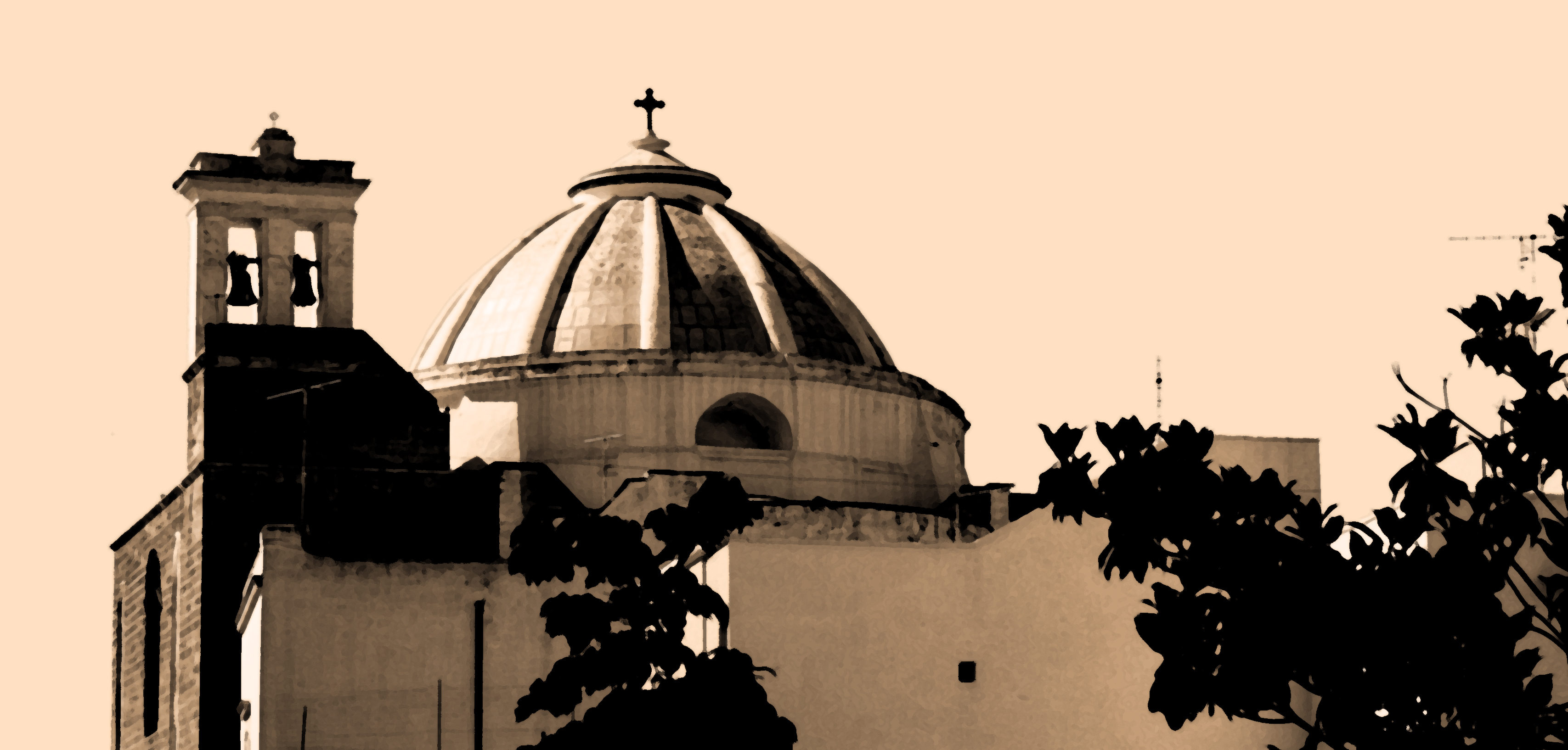 Cupola della chiesa madre di Neviano (Le)